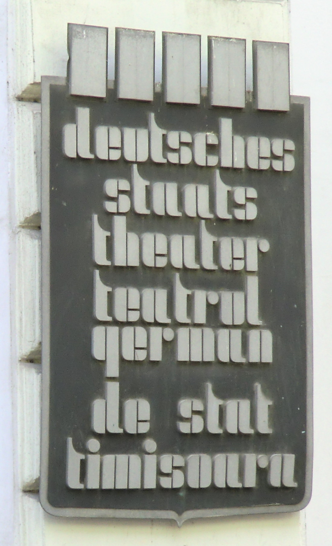 Deutsches Staatstheater Temeswar, Eingangsschild